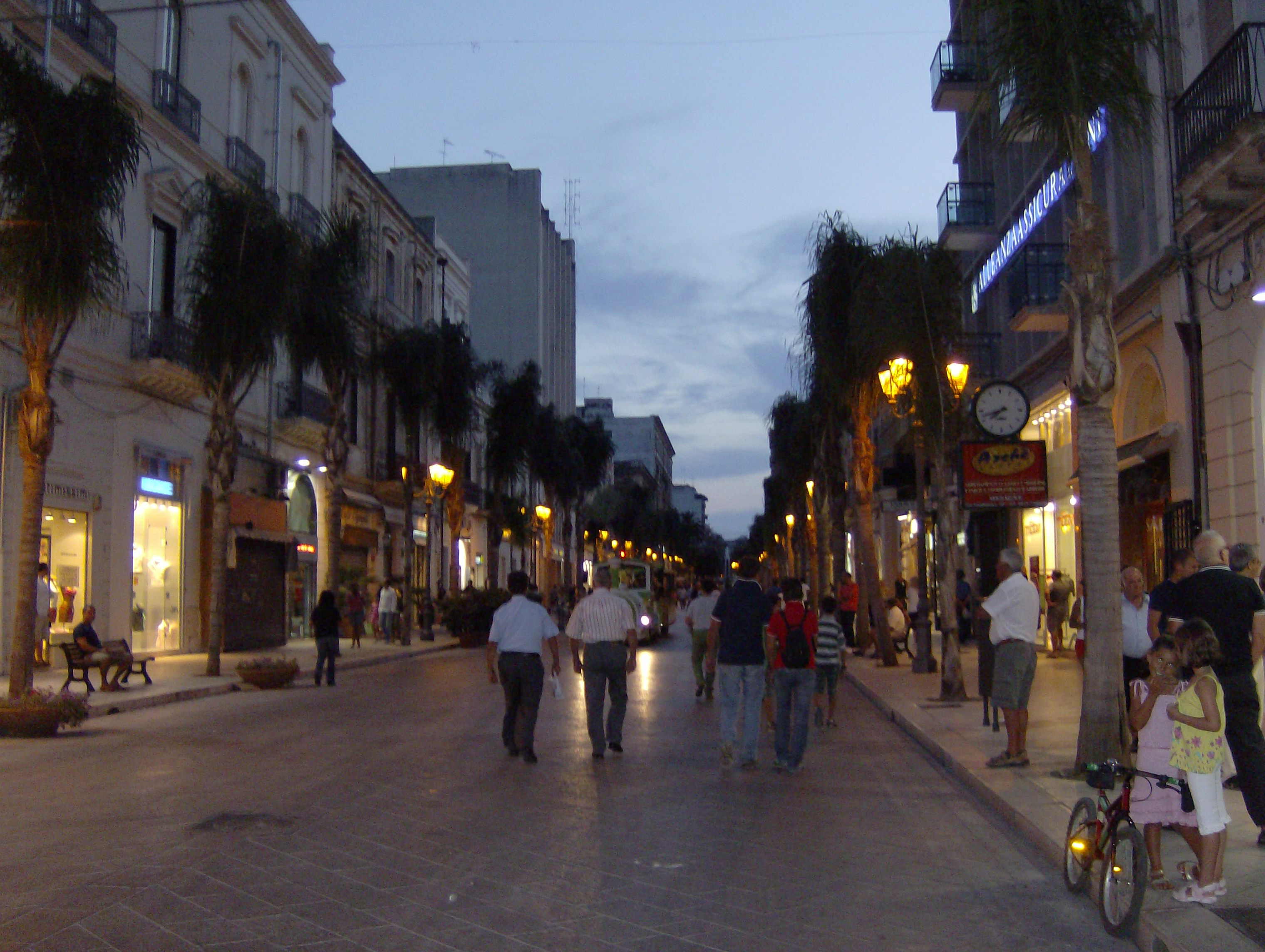 Io sono l'autore, Teatro Versi Brindisi